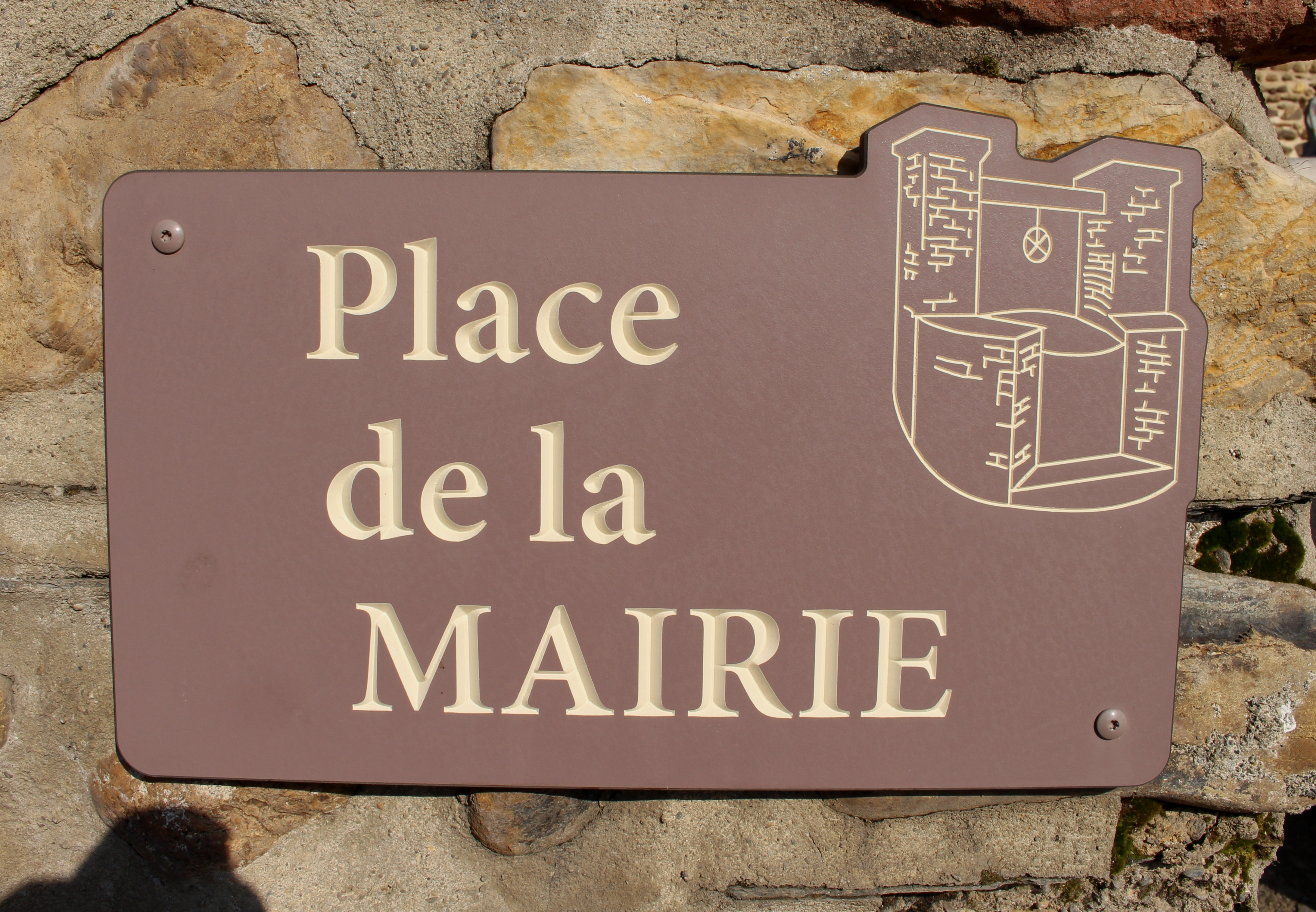 Rue du village de Peyraube (Hautes-Pyrénées)